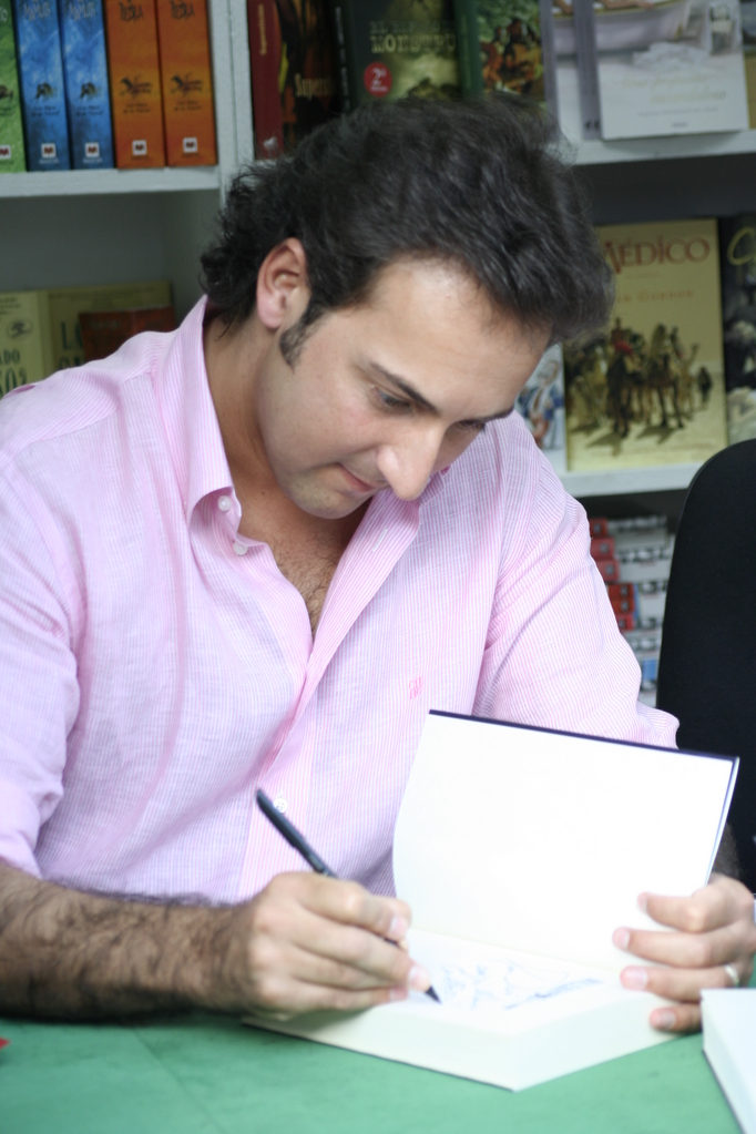 Iker Jiménez en la Feria de Libro de Madrid 2006